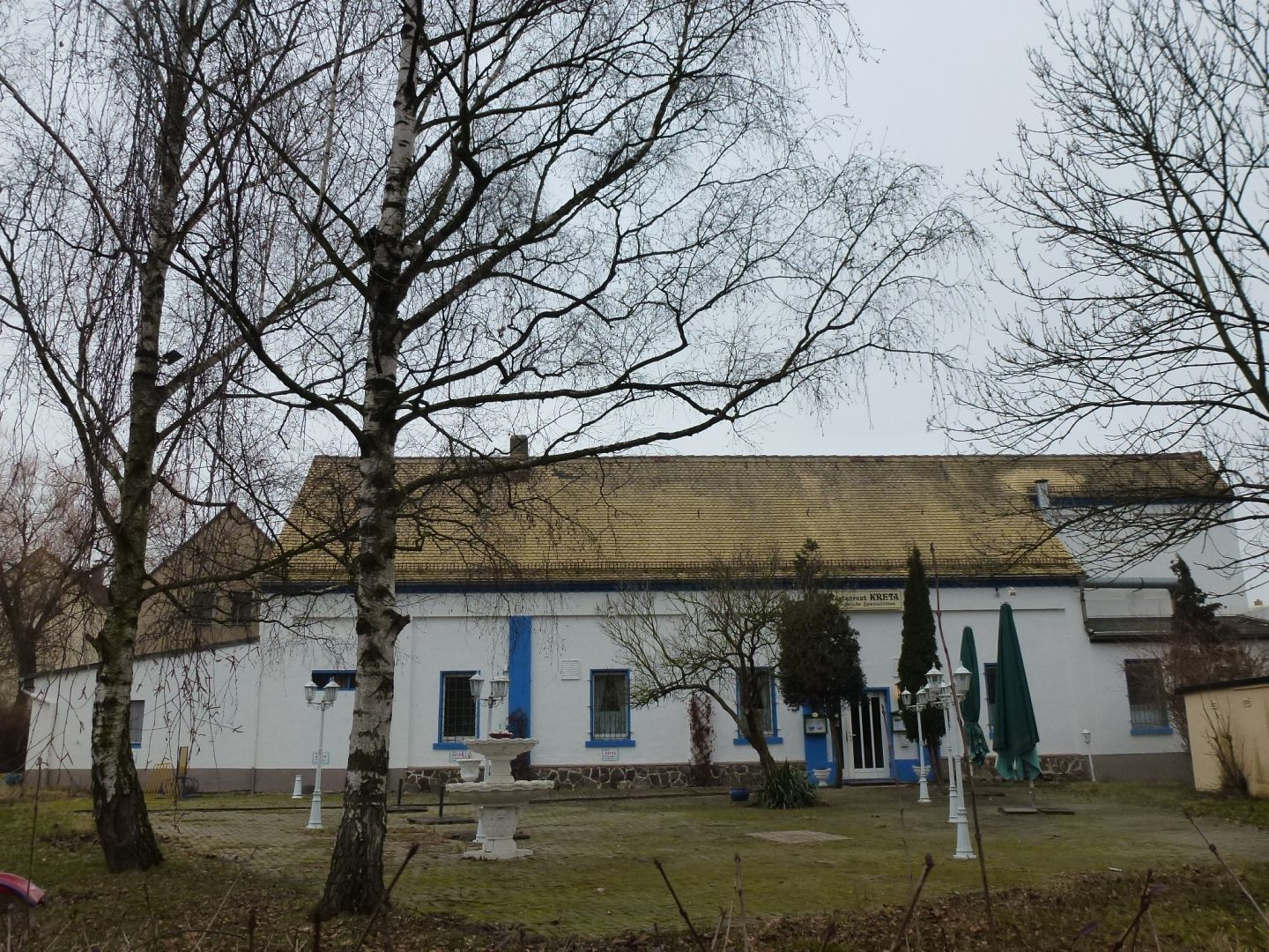 Restaurant Kreta in Burghausen